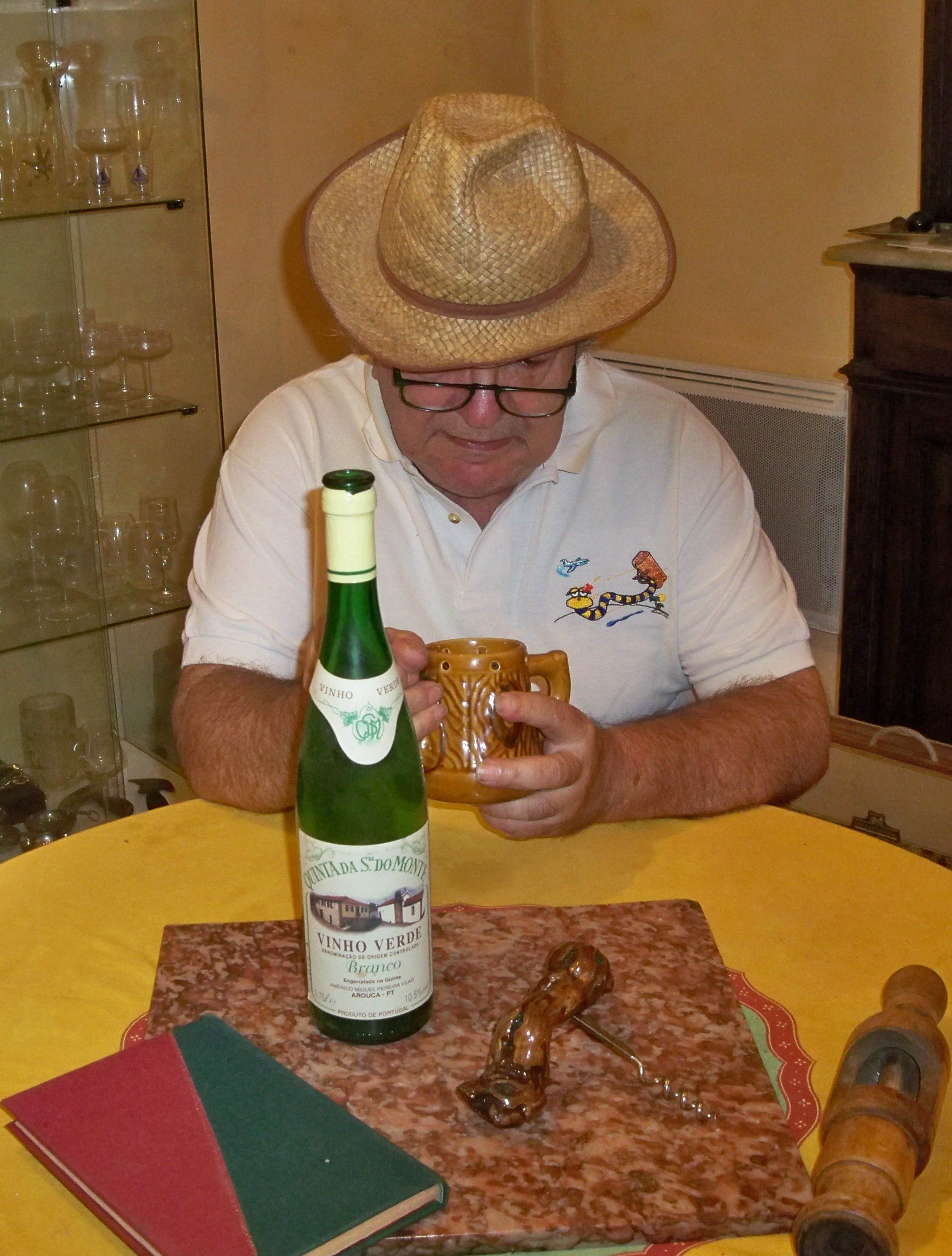 dégustation de vihno verde